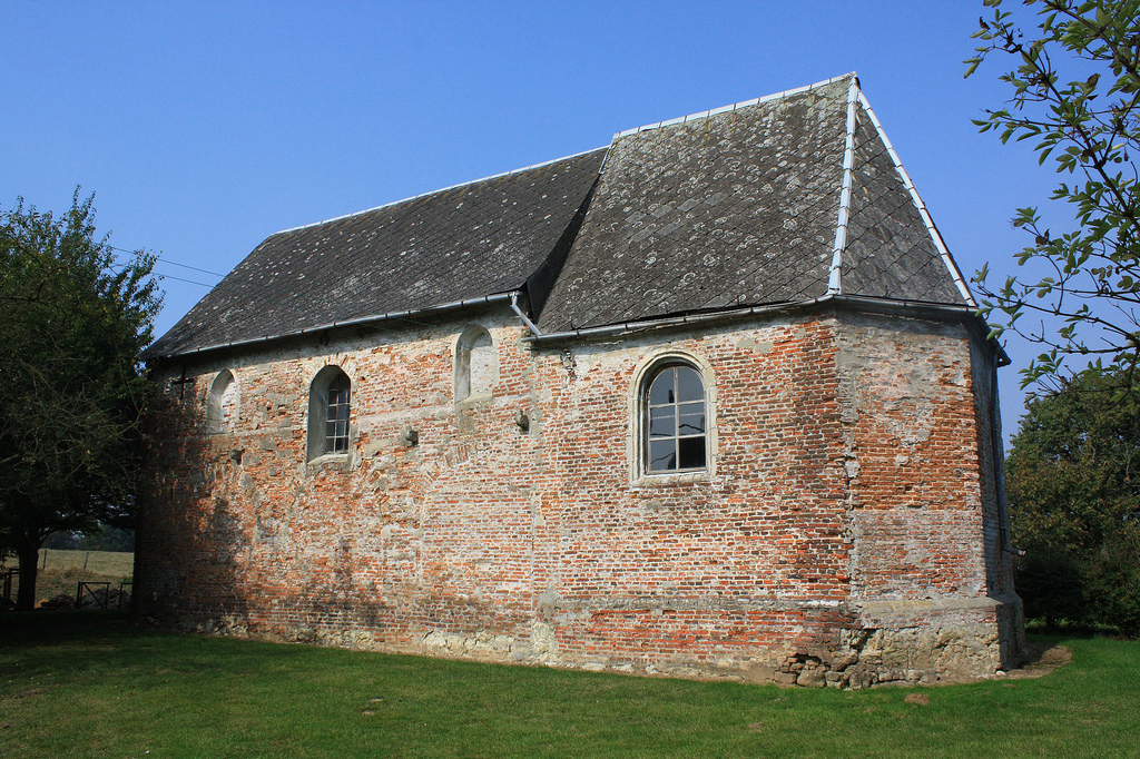 Het kapelletje van Onze-Lieve-Vrouw van Klein-Jeuk